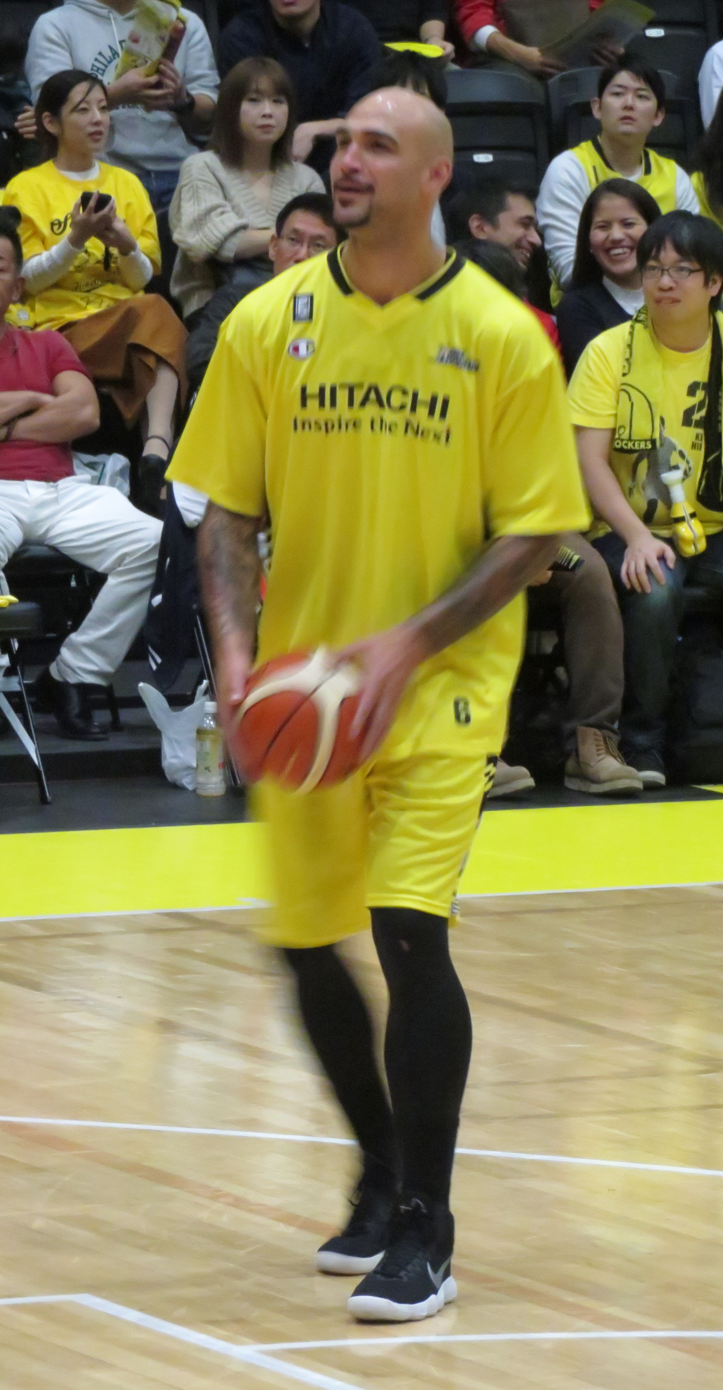 2018年10月28日撮影 2018-19 B1 第六節 渋谷-横浜 青山学院記念館